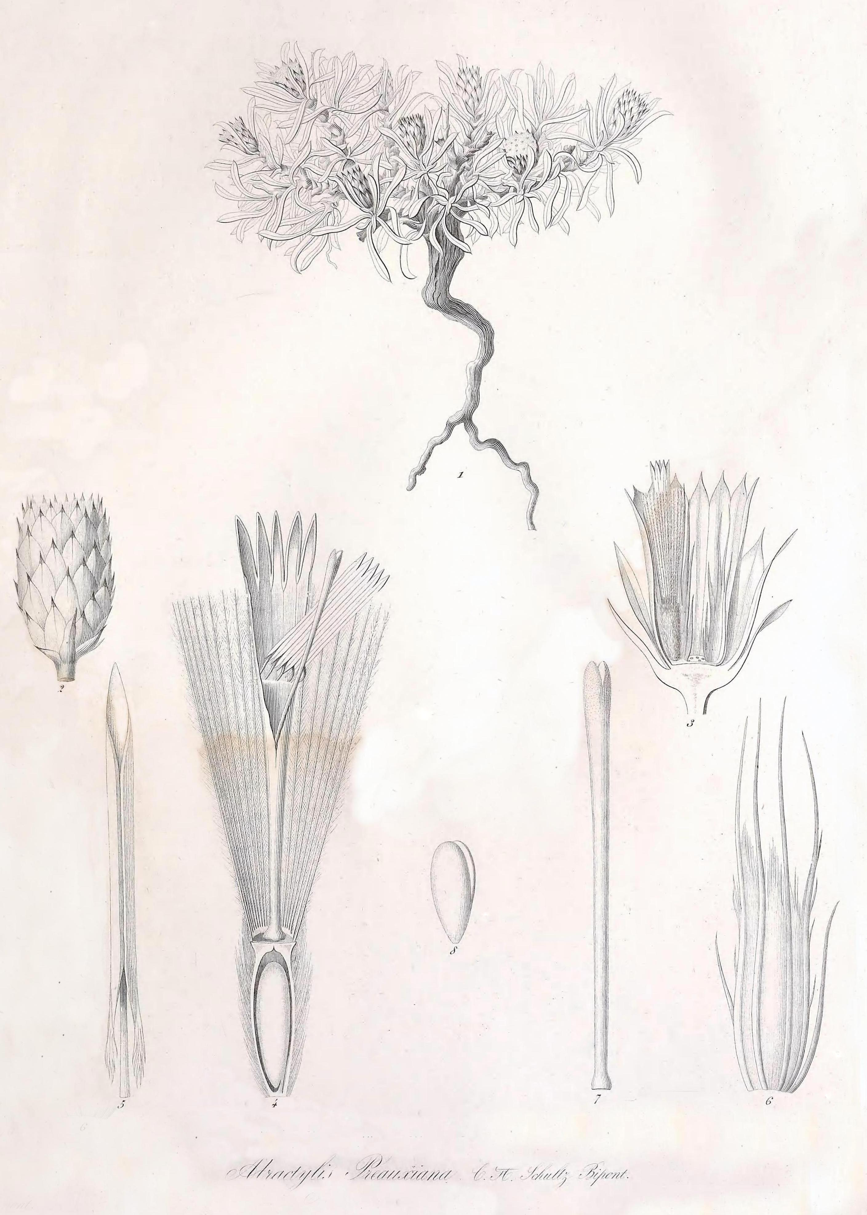 Atractylis preauxiana - Figuración original de Carl Heinrich Bipontinus Schultz y publicado en Histoire Naturelle des Îles Canaries, t.3, pt. 2, sect. 2, p. 350, Tab. 117, 1846.